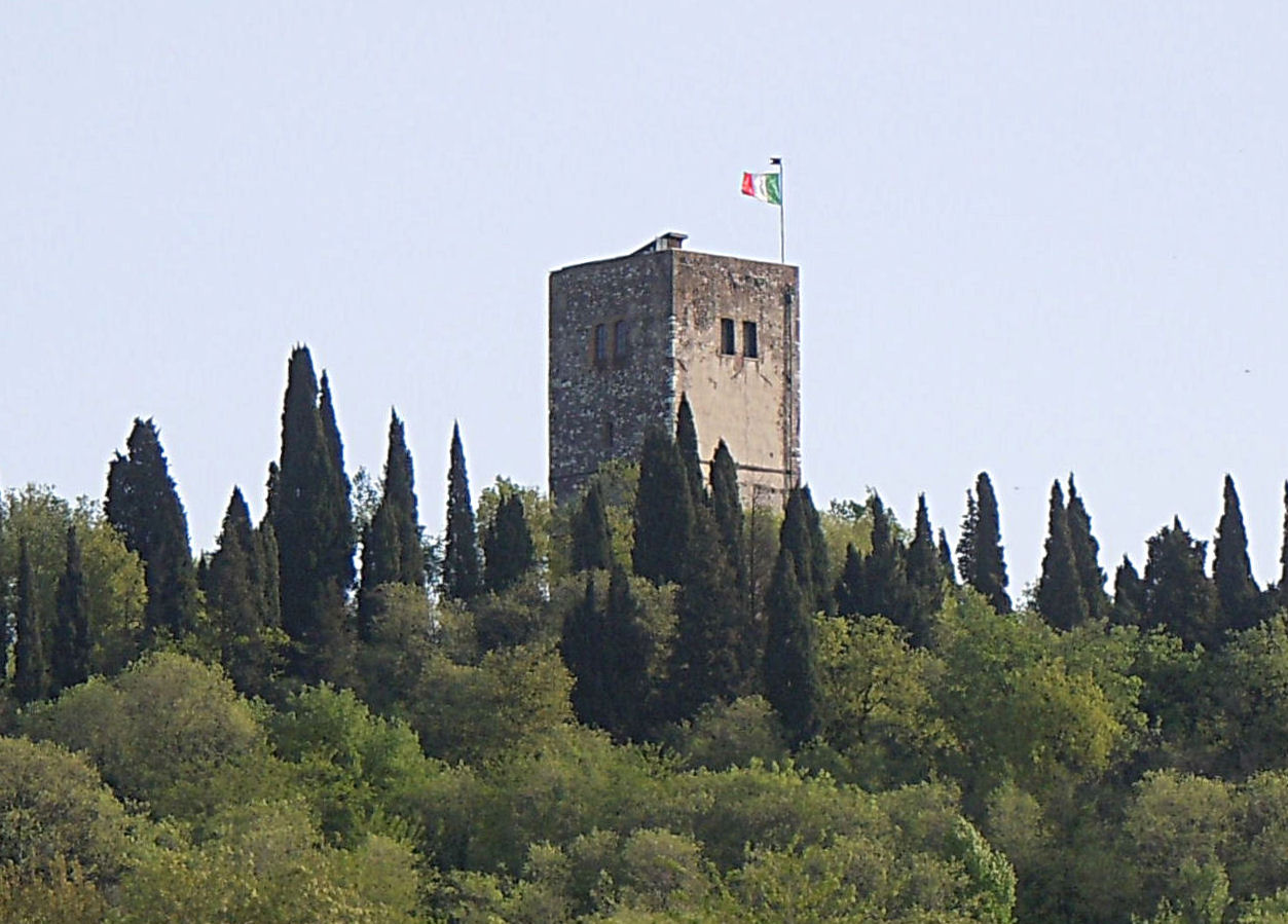 Solferino, la Rocca detta "La Spia d'Italia".